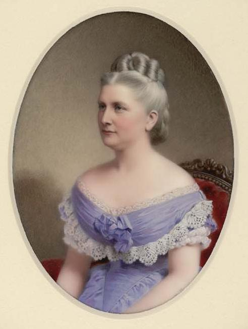 First Lady Harriet Lane